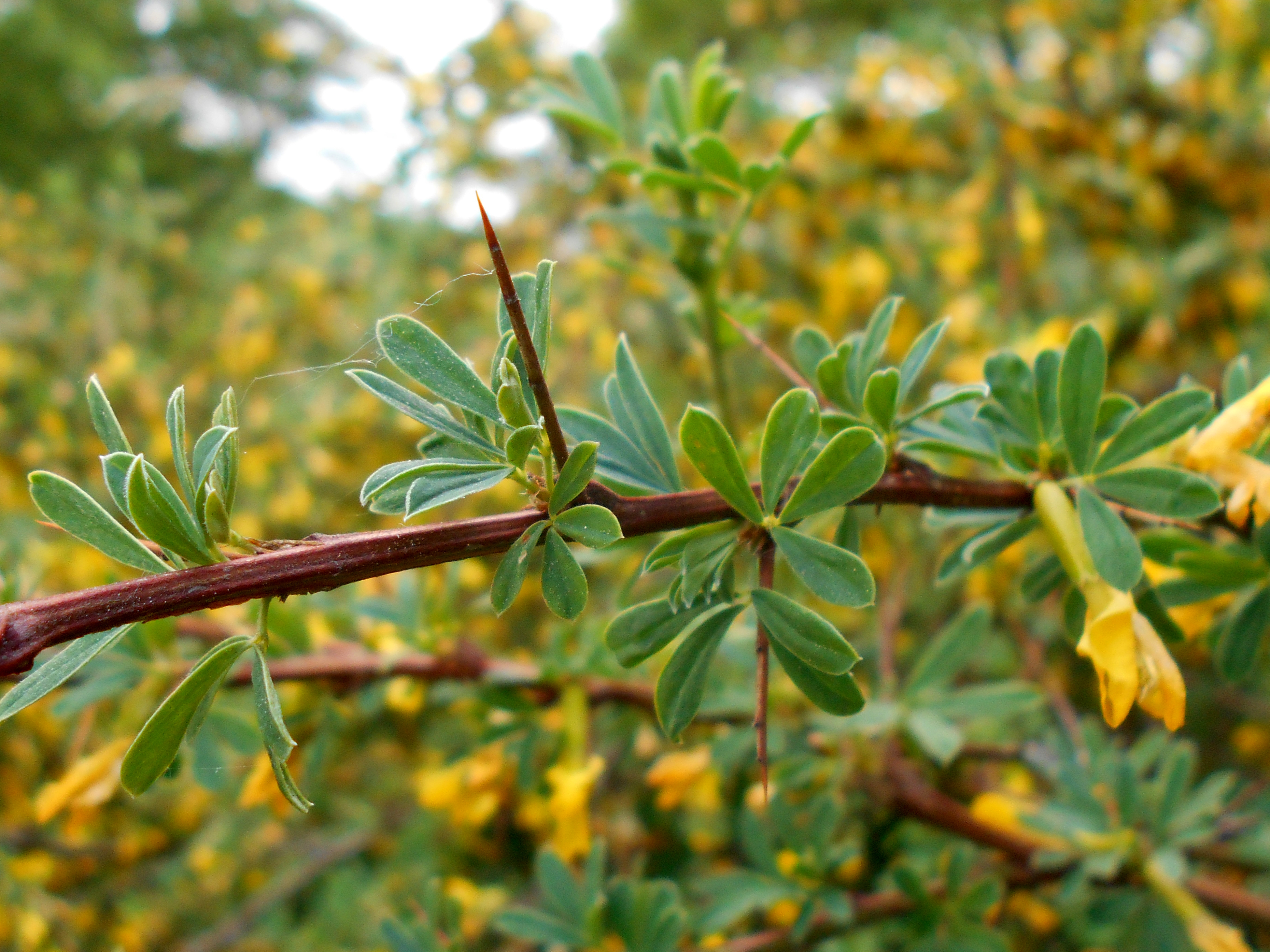 Karagana ciernista (Caragana spinosa), Botanischer Garten Berlin.